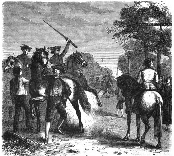 Ringstechen in Seeland